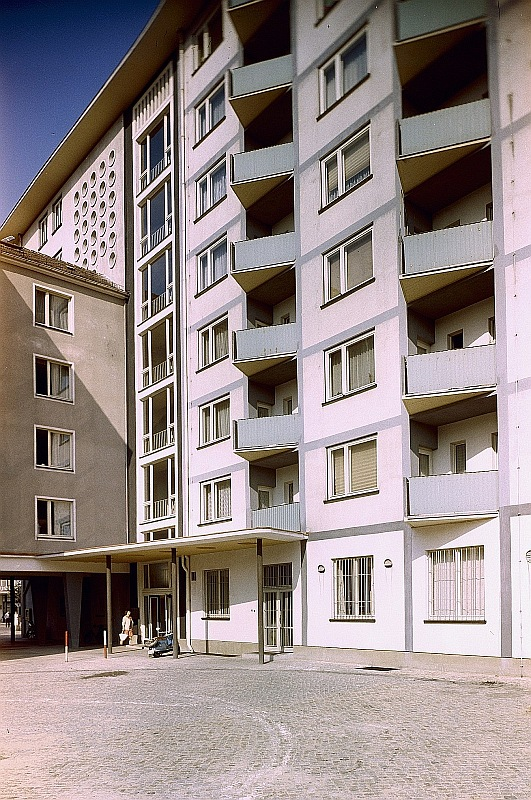 Original image description from the Deutsche FotothekDresden. Neubaublock in der Borsbergstraße